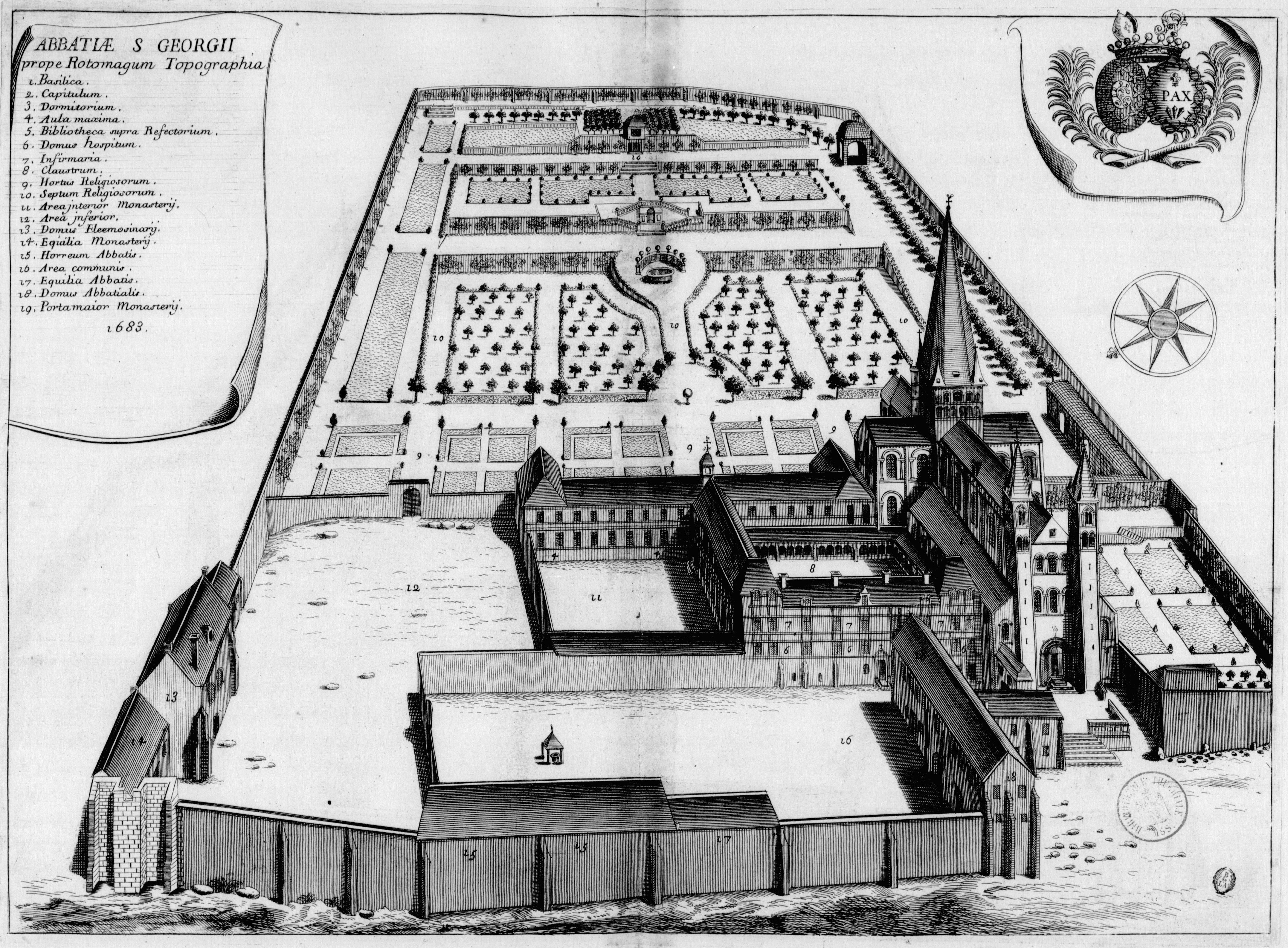 Planche gravée du 17ème siècle représentant l'abbaye Saint-Georges-de-Boscherville, dans le livre Monasticon Gallicanum.